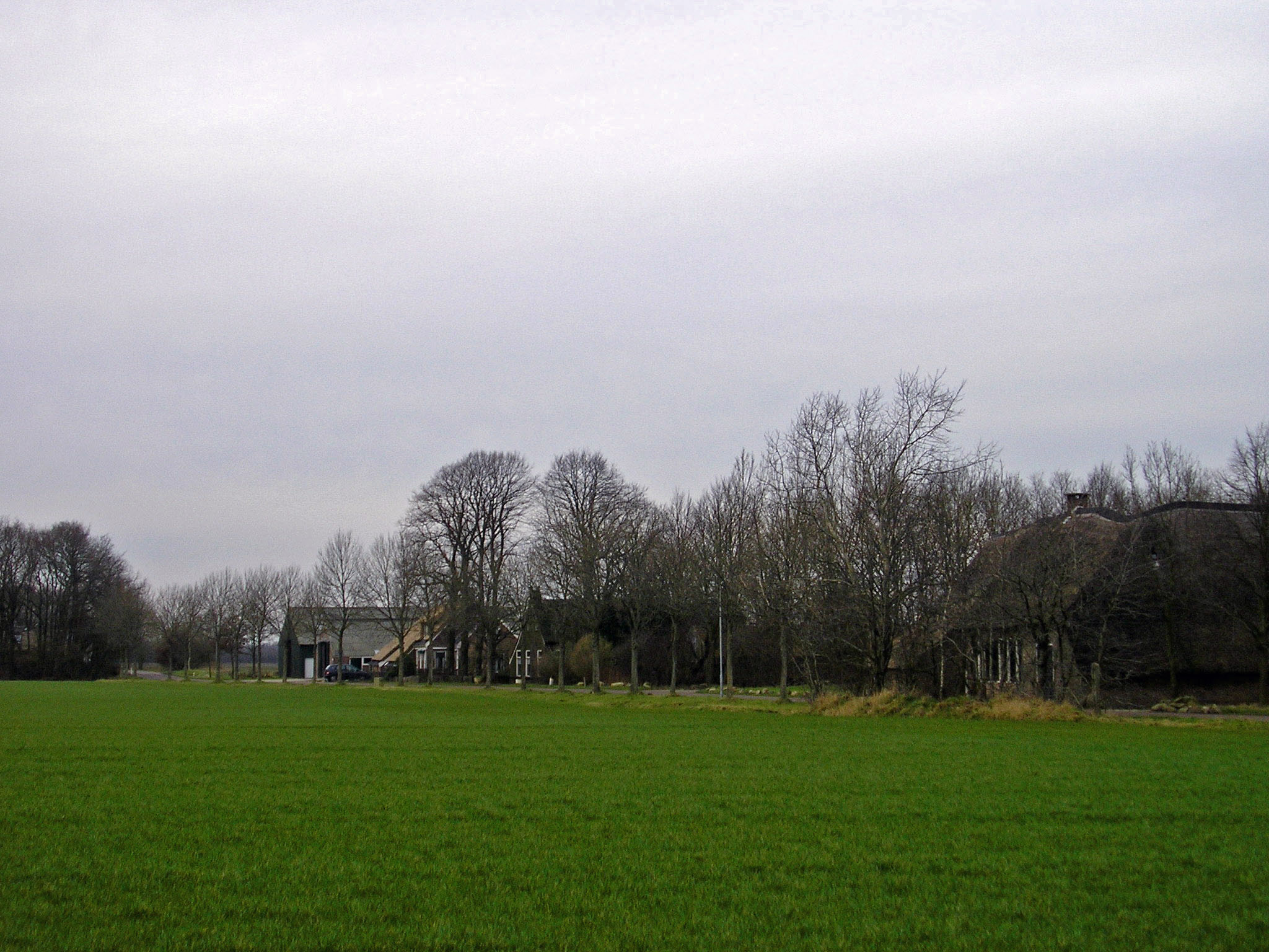 Gezicht op Rhee, bij Assen (Nederland). Helemaal rechts de monumentale Picardthoeve, een hallehuisboerderij met krimp. De naam van de hoeve is ontleend aan Johan Picardt (×1600, †1670), predikant in Rolde en historicus, die zich daar in 1644 vestigde.